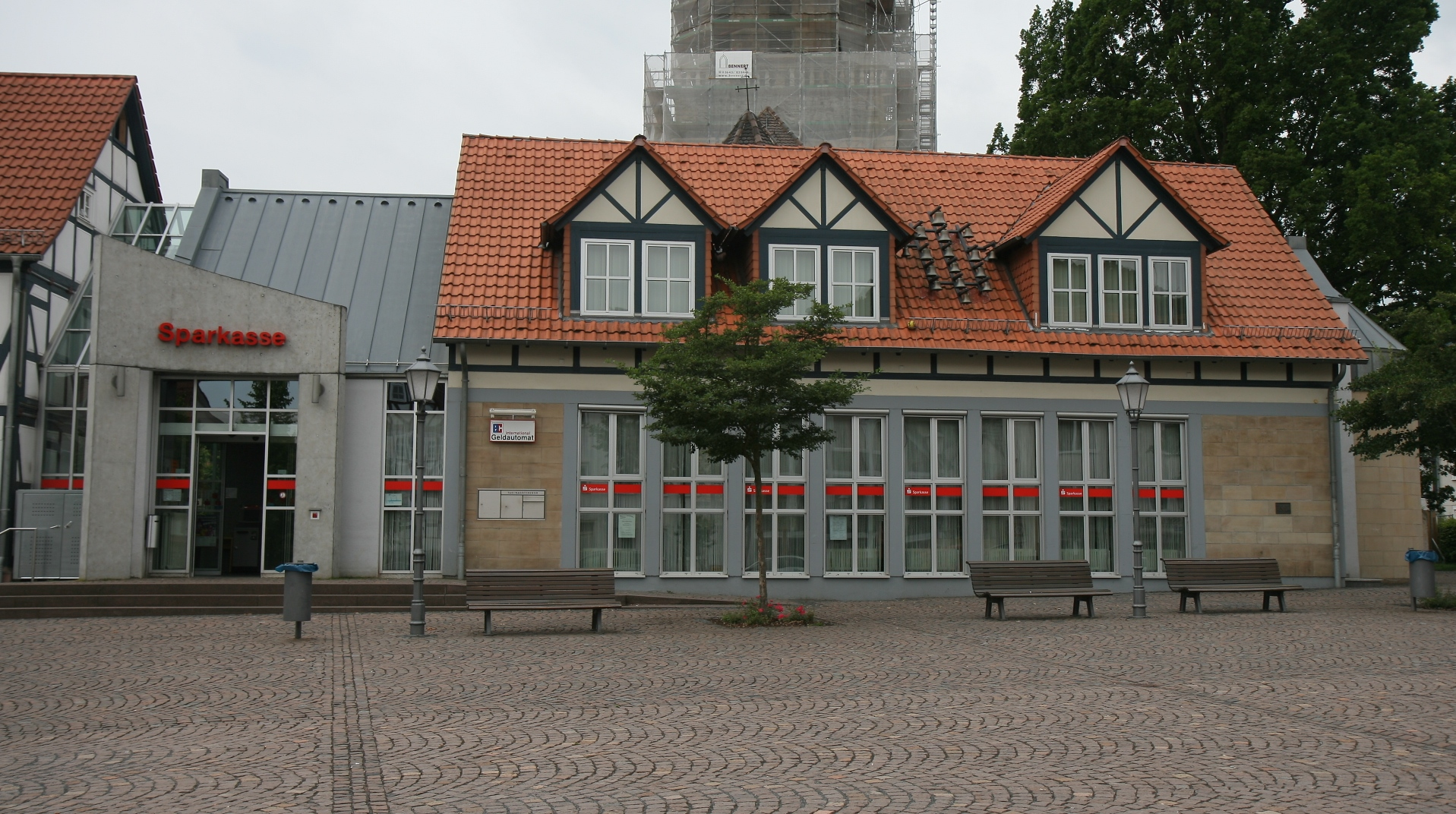 Kasseler Sparkasse, Geschäftsstelle Zierenberg, Marktplatz 9 in Zierenberg.